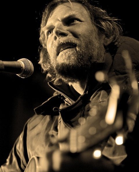 Tim Bluhm